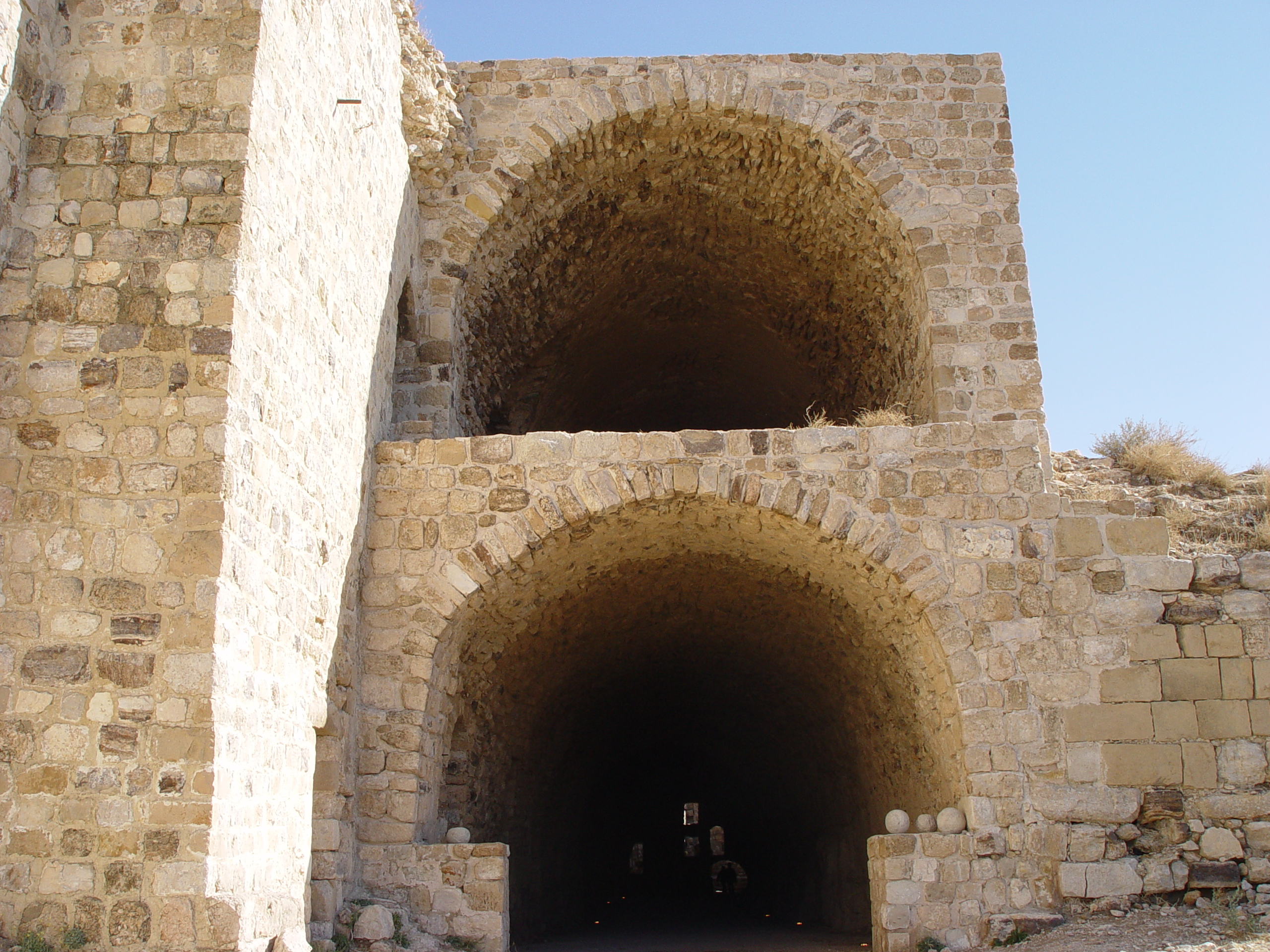 The Karak crusader castle In Karak City in Jordan